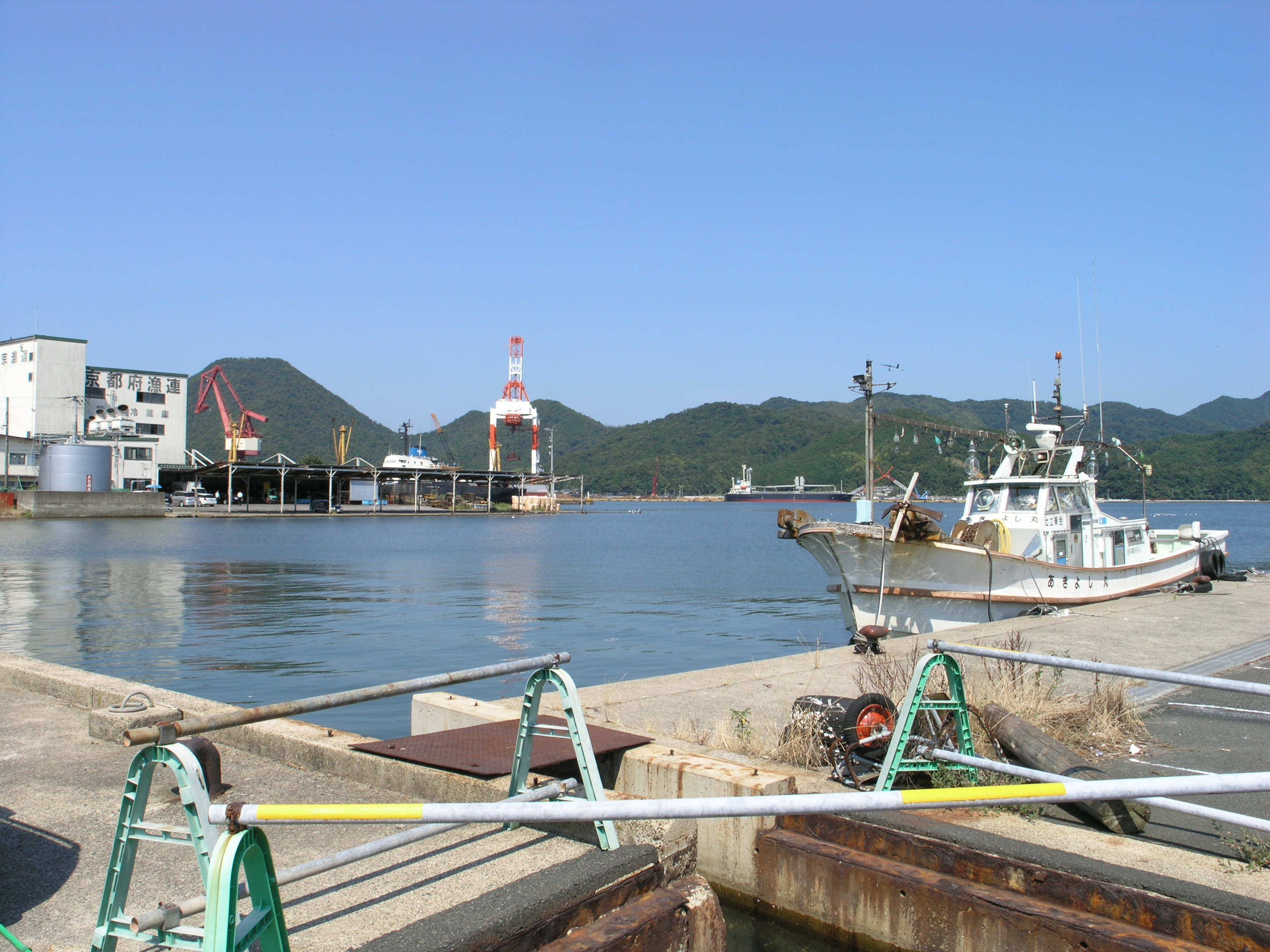 舞鶴漁港 (京都府舞鶴市、国道177号起点付近) 2008年8月撮影。 機材：C8080WZ 撮影者：Kansai explorer